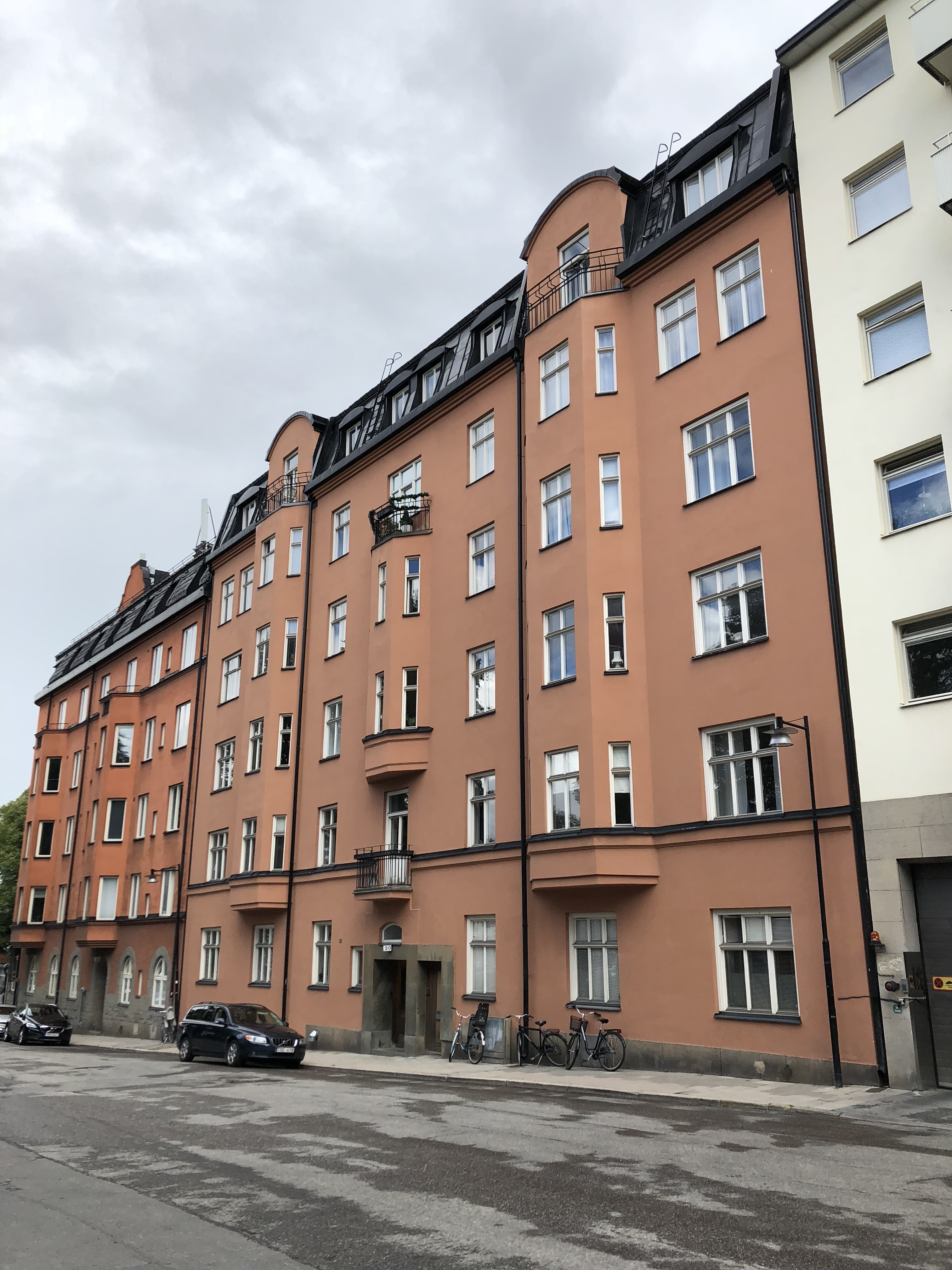 Dannemoragatan 20 i Stockholm, fastigheten Sländan 2.